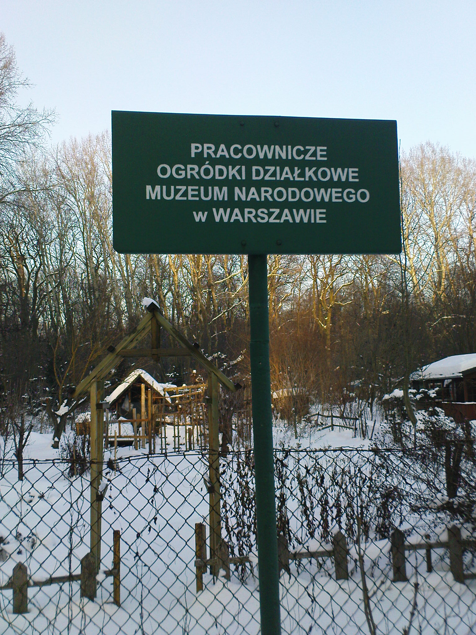 Na terenie morysińskiego parku znajduje się kompleks działek pracowniczych - zimą tylko leśne zwierzęta o nich pamiętają.